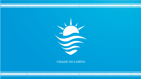 Lobito Flag